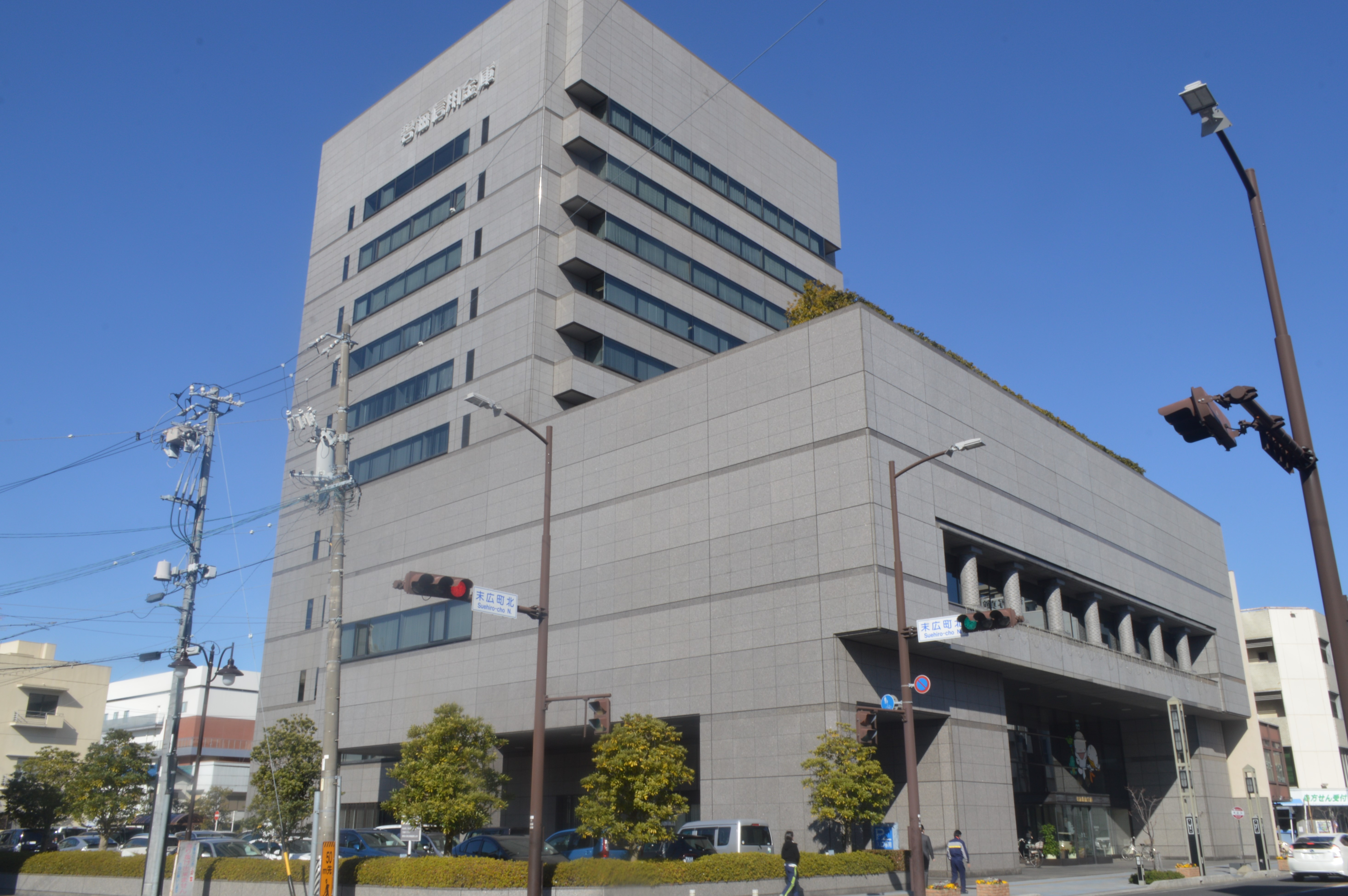 愛知県安城市にある碧海信用金庫本店。